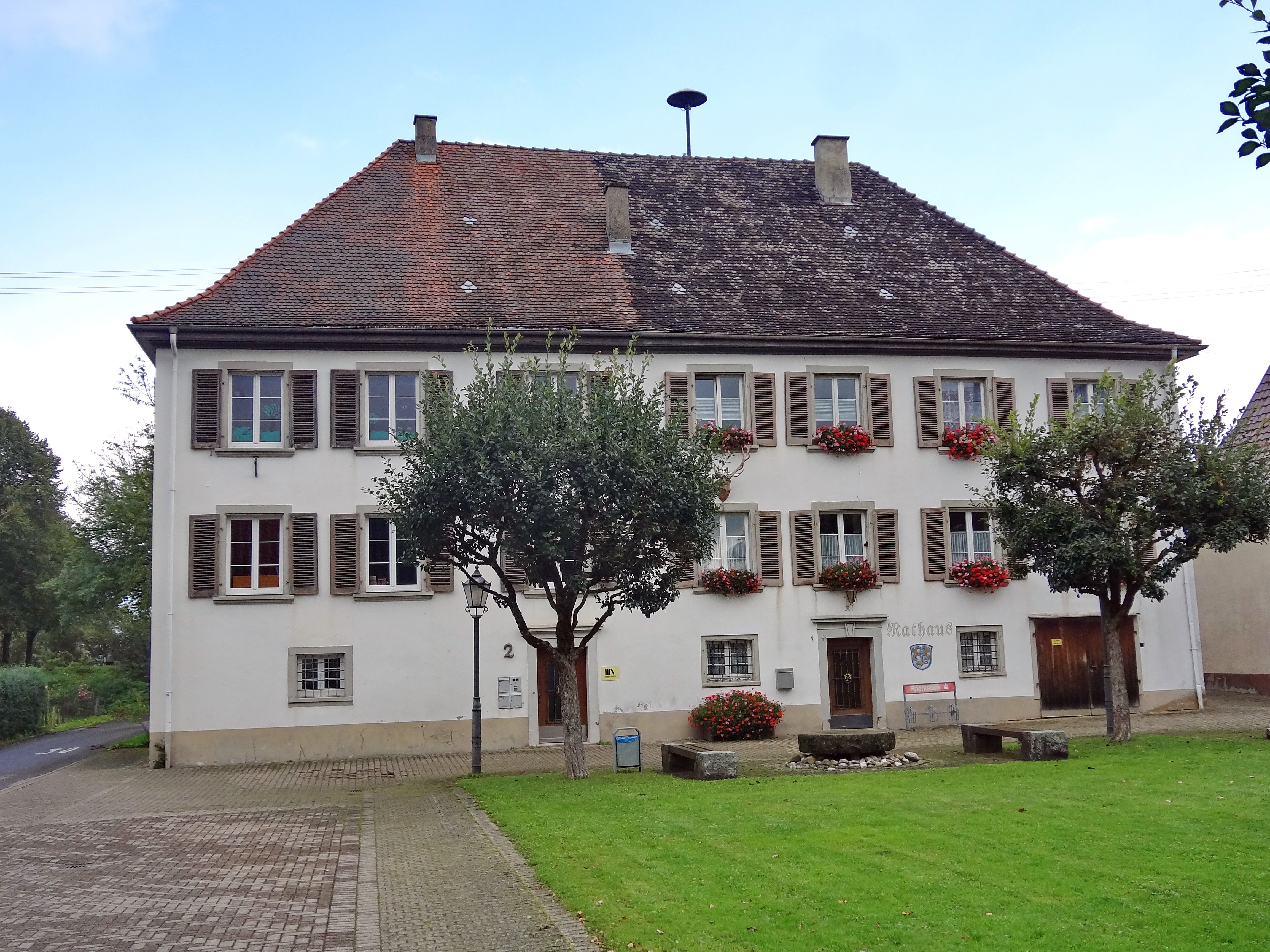 Ehemaliges Schloss, Geisingen-Aulfingen